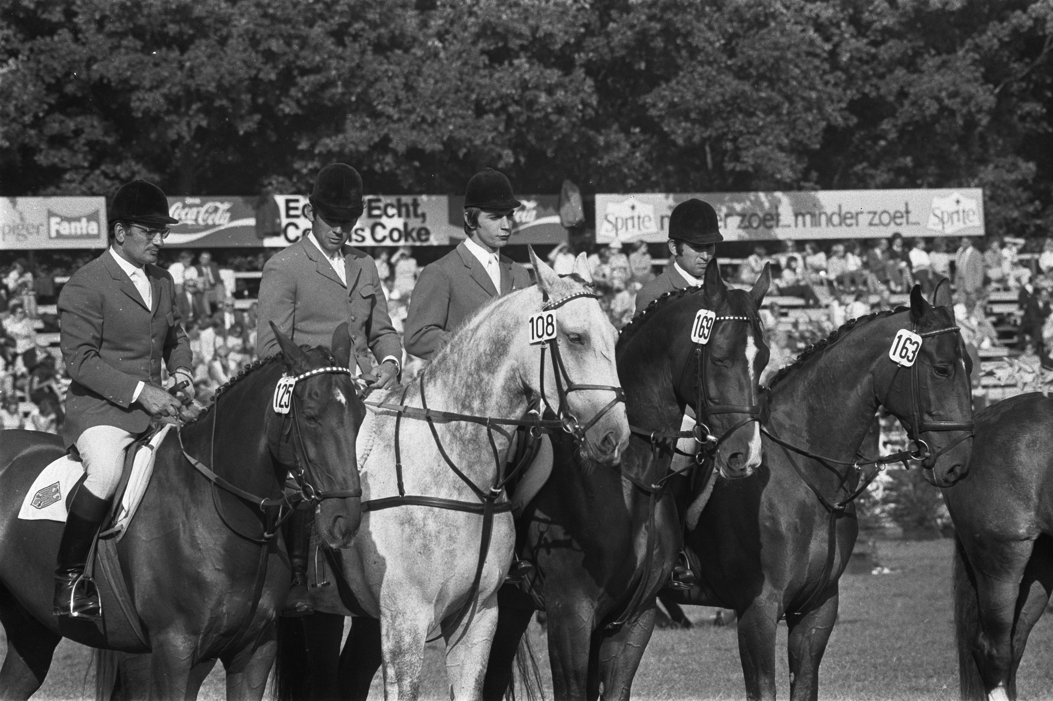 Depicted people: Hans Günter Winkler, Fritz Ligges, Hendrik Snoek and Hugo Simon – Members of the show jumping team of the FRG, winners of the 1971 Rotterdam Nations Cups (Source: Max E. Ammann (1983) Geschichte des Pferdesports: Springen, Military, Dressur, Fahren, Gütersloh: Prisma-Verlag, Sonderausgabe, p. 185 ISBN: 3-570-09074-4. )